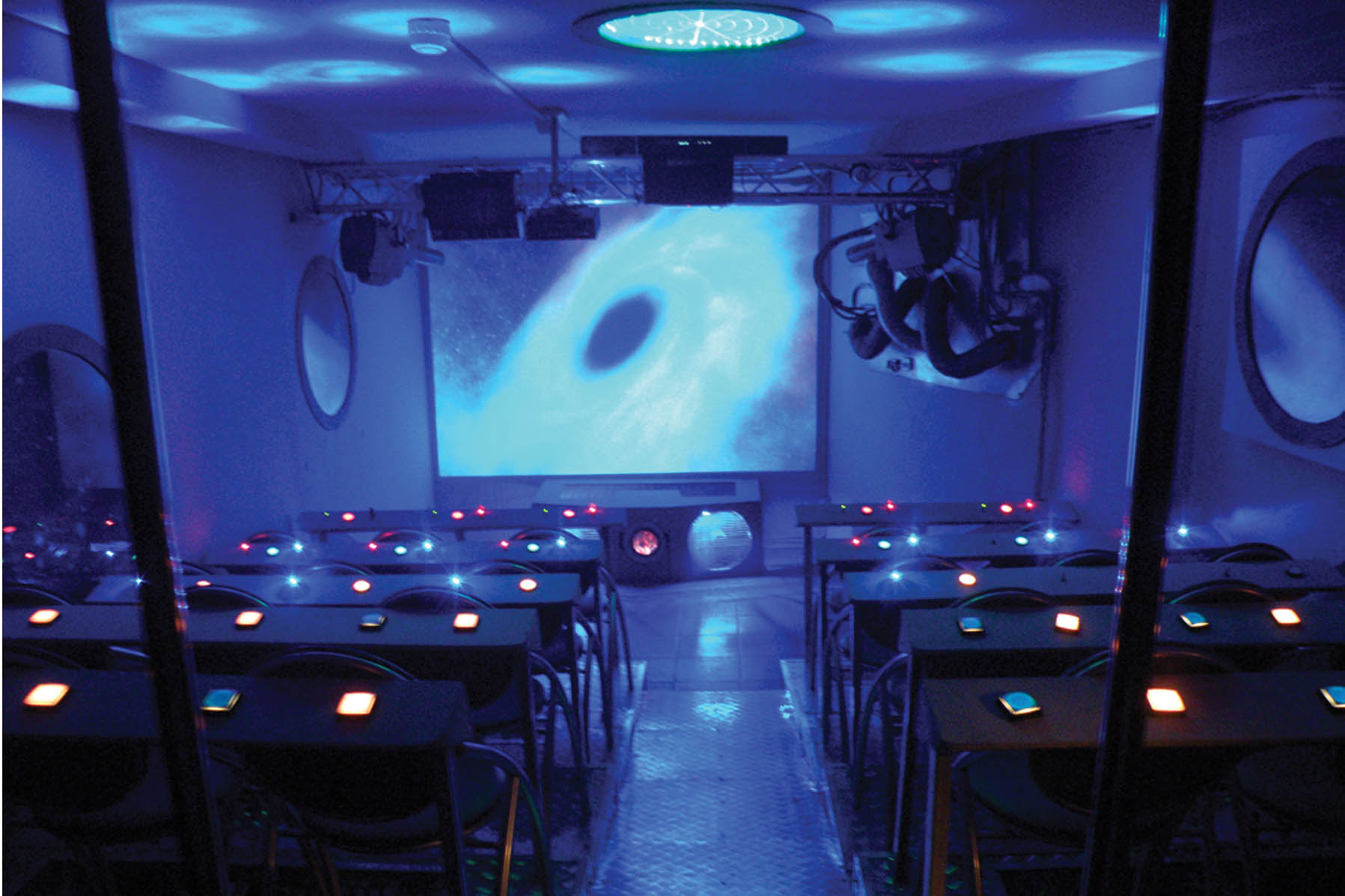 Зал Космическое Путешествие Петербургского Планетария